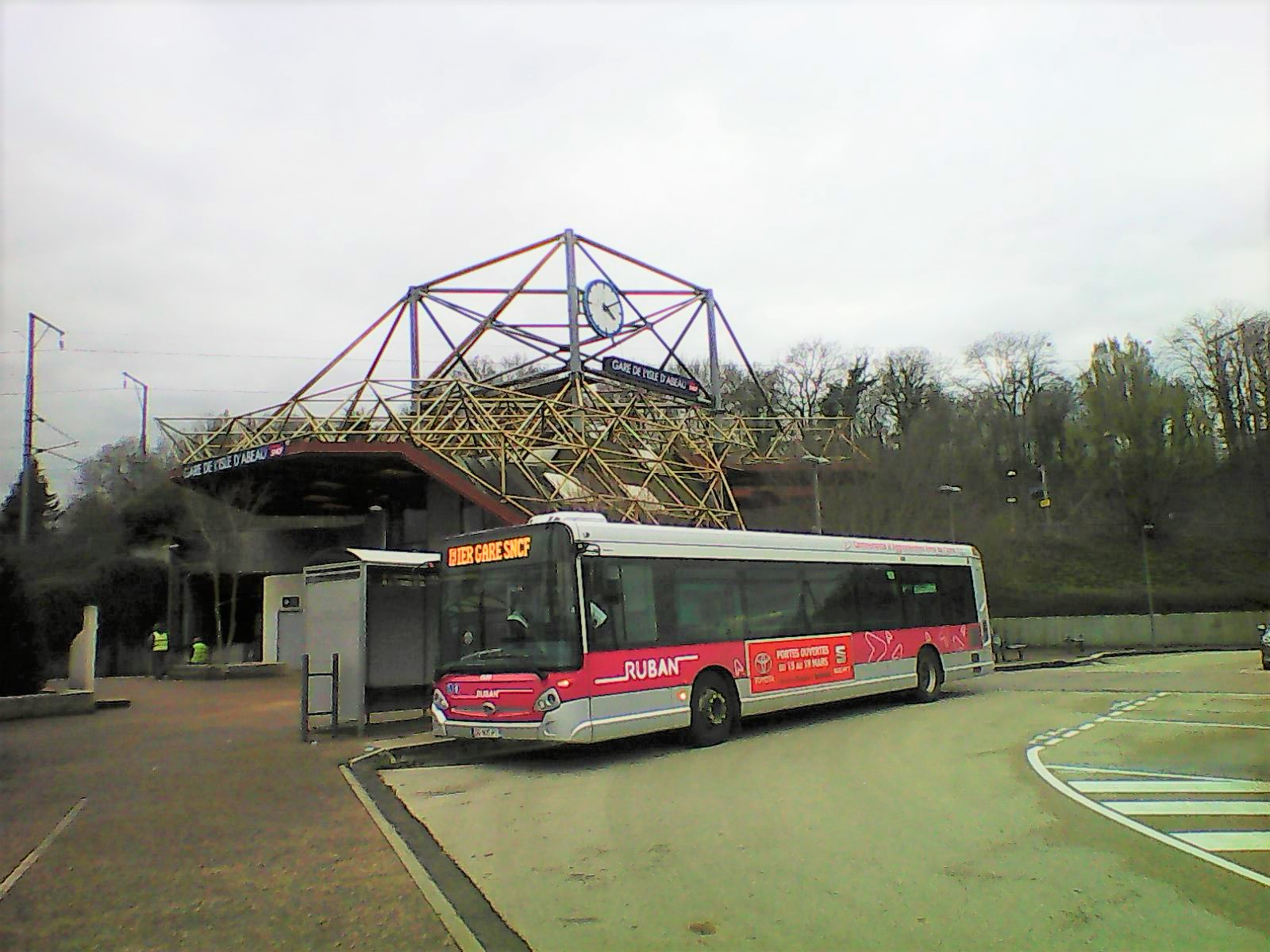 Bus du réseau ruban à l'Isle d'Abeau en mars 2019